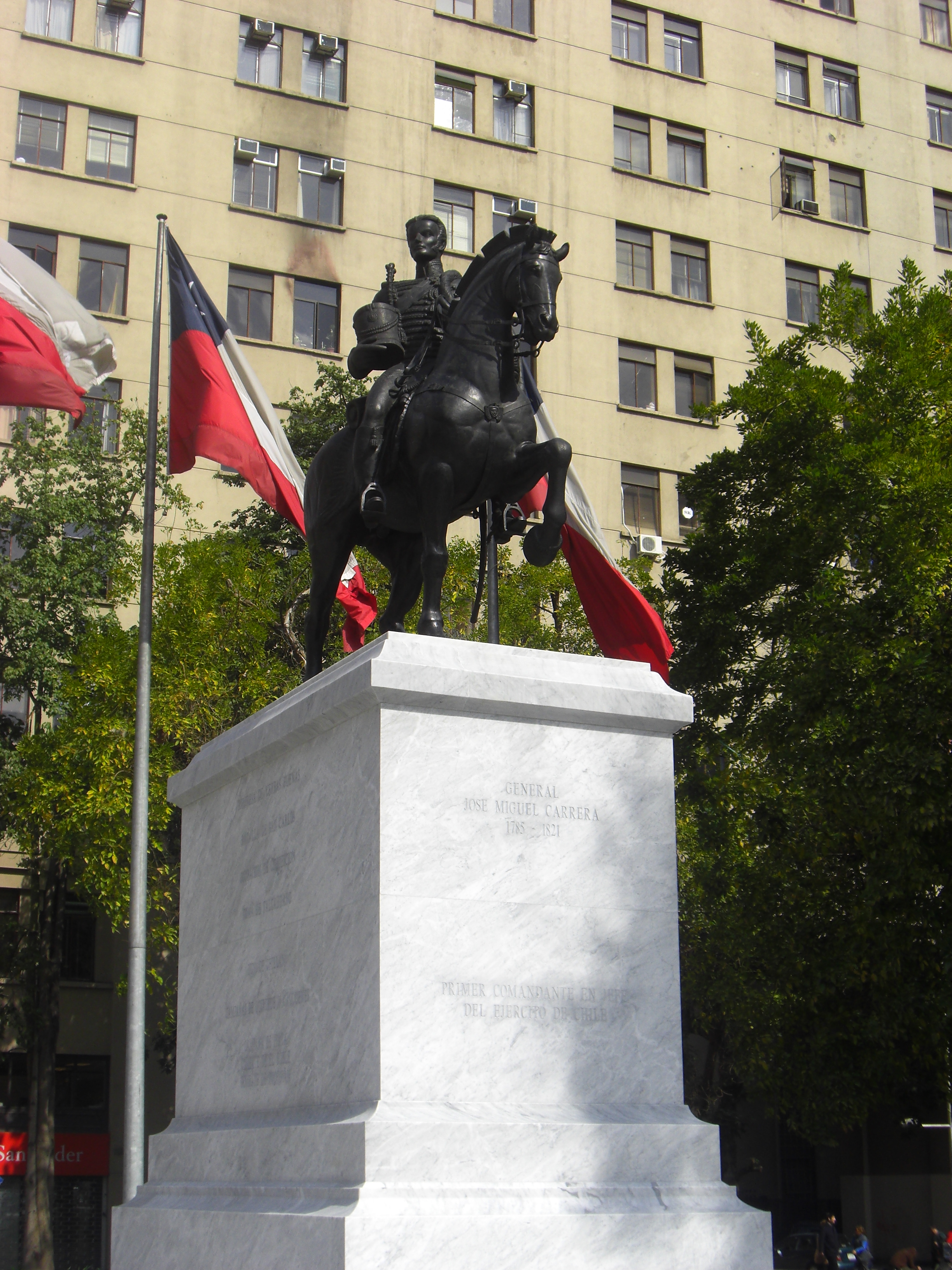 Monumento ecuestre del General José M. Carrera, trasladado a la Plaza de la Ciudadanía con motivo del Bicentenario de la Patria, para realzar la figura de José Miguel Carrera, y su rol en la Independencia de la nación. Es obra del escultor chileno Héctor Román.